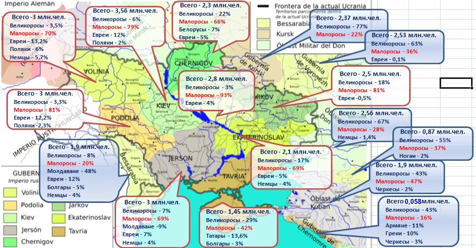 Население юга России на 1897 г.